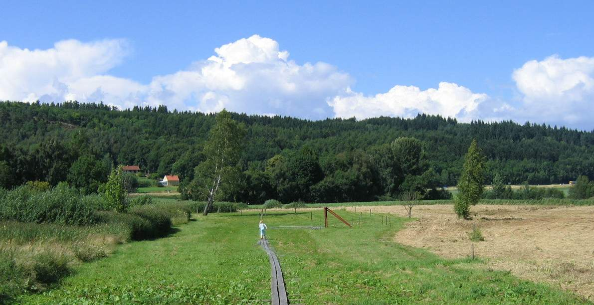 Alvastra pile dwelling